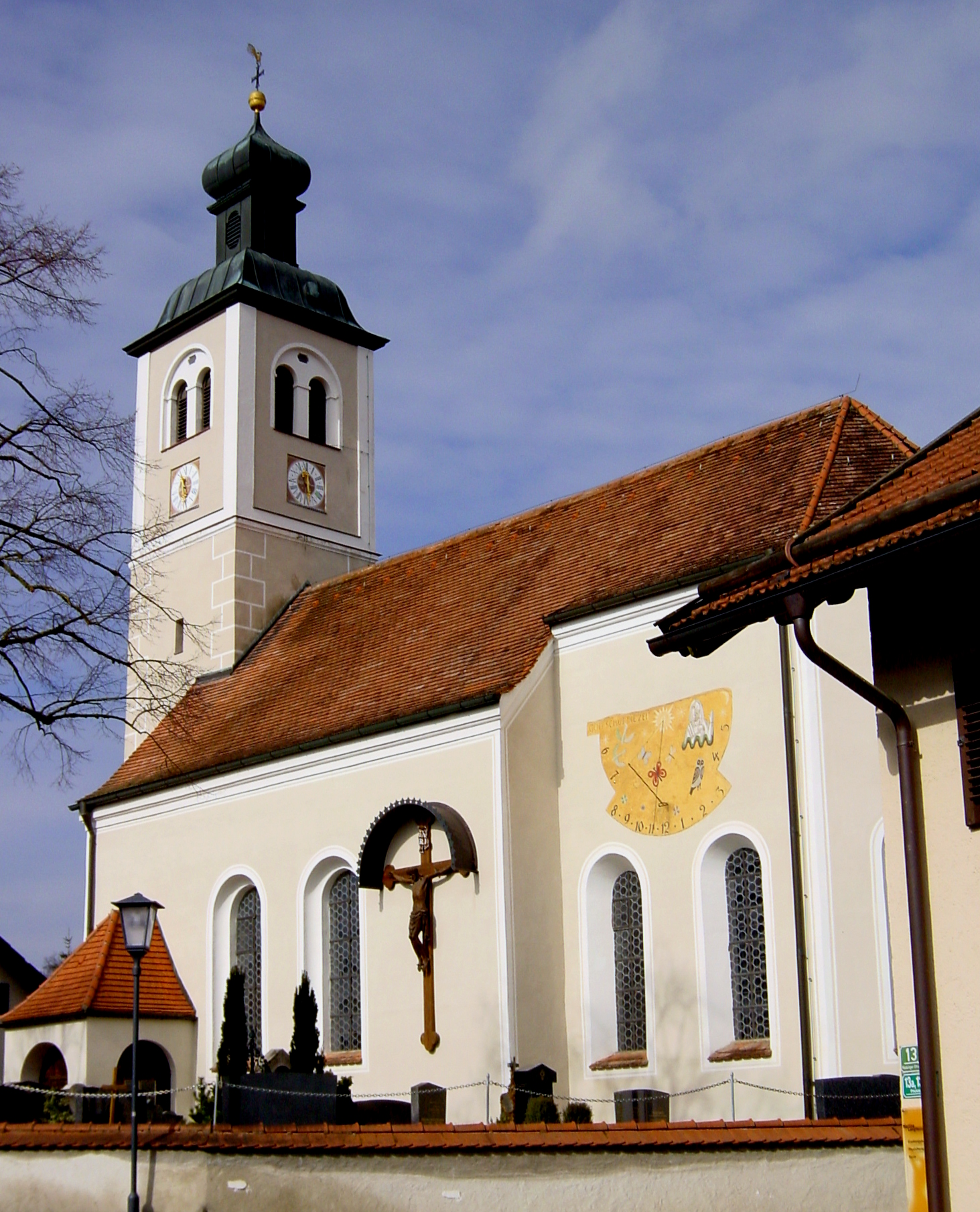 Starnberg, OT Perchting, Kirche Mariä Heimsuchung